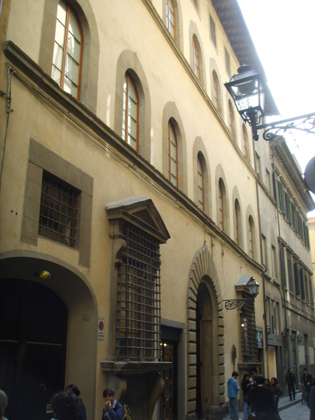 Palazzo tanagli, esterno